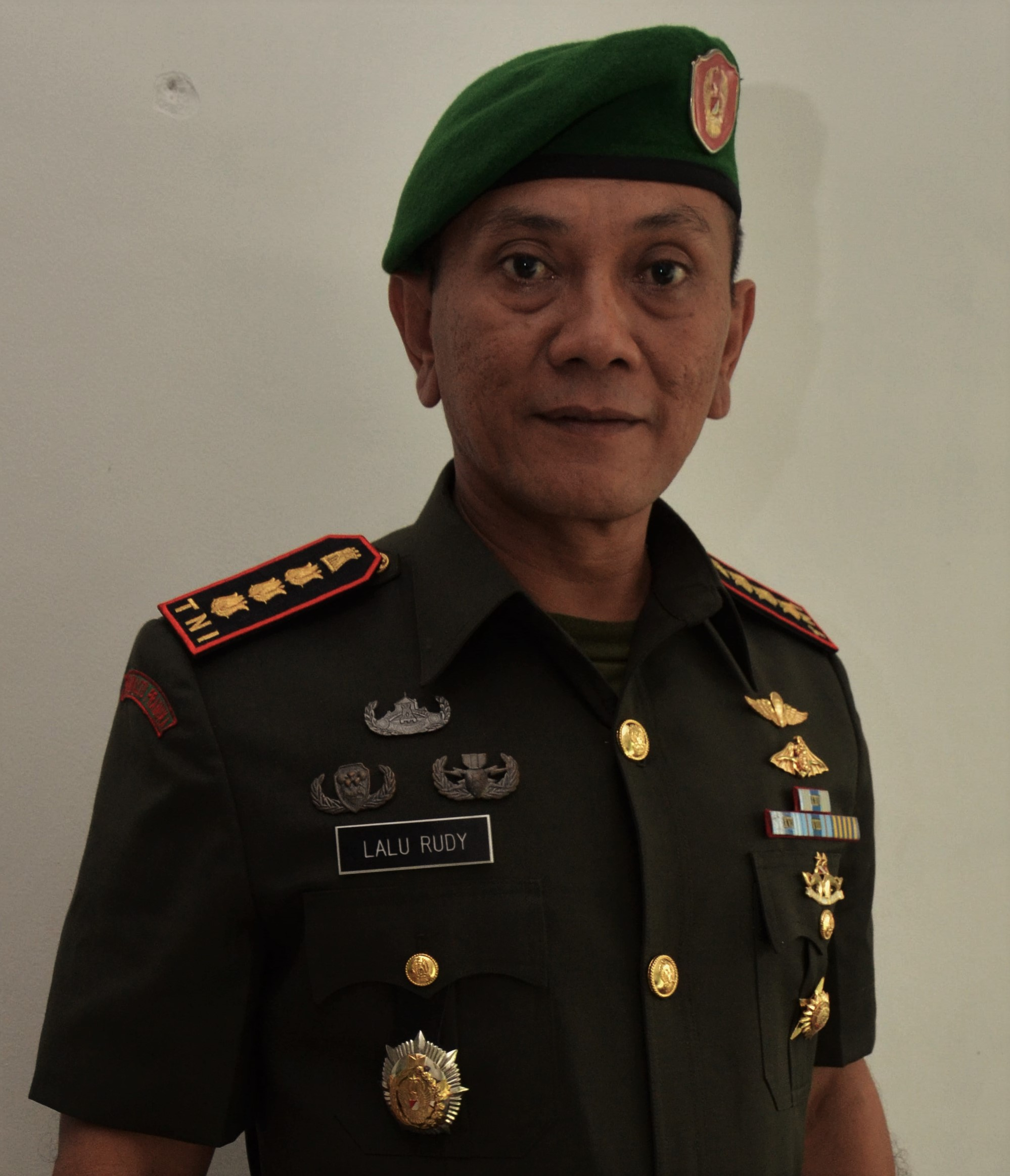 Uniform Baret